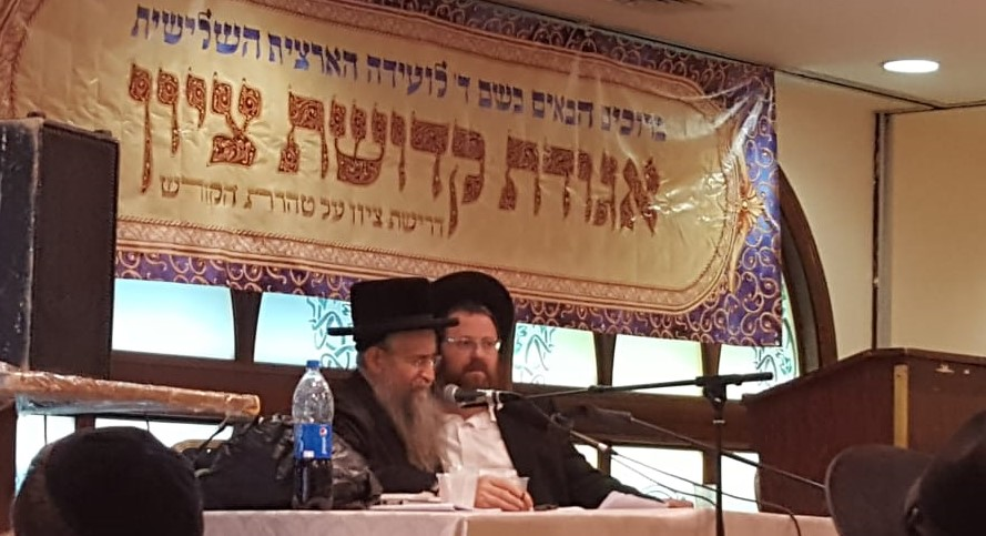 הוועידה הארצית השלישית של אגודת קדושת ציון, אולמי פארימה פאלאס ירושלים, ליל כ"ו באייר תשע"ט, נואם: הרב מנחם מנדל טוביאס שליט"א, לצידו יושב הרב יהודה אפשטיין